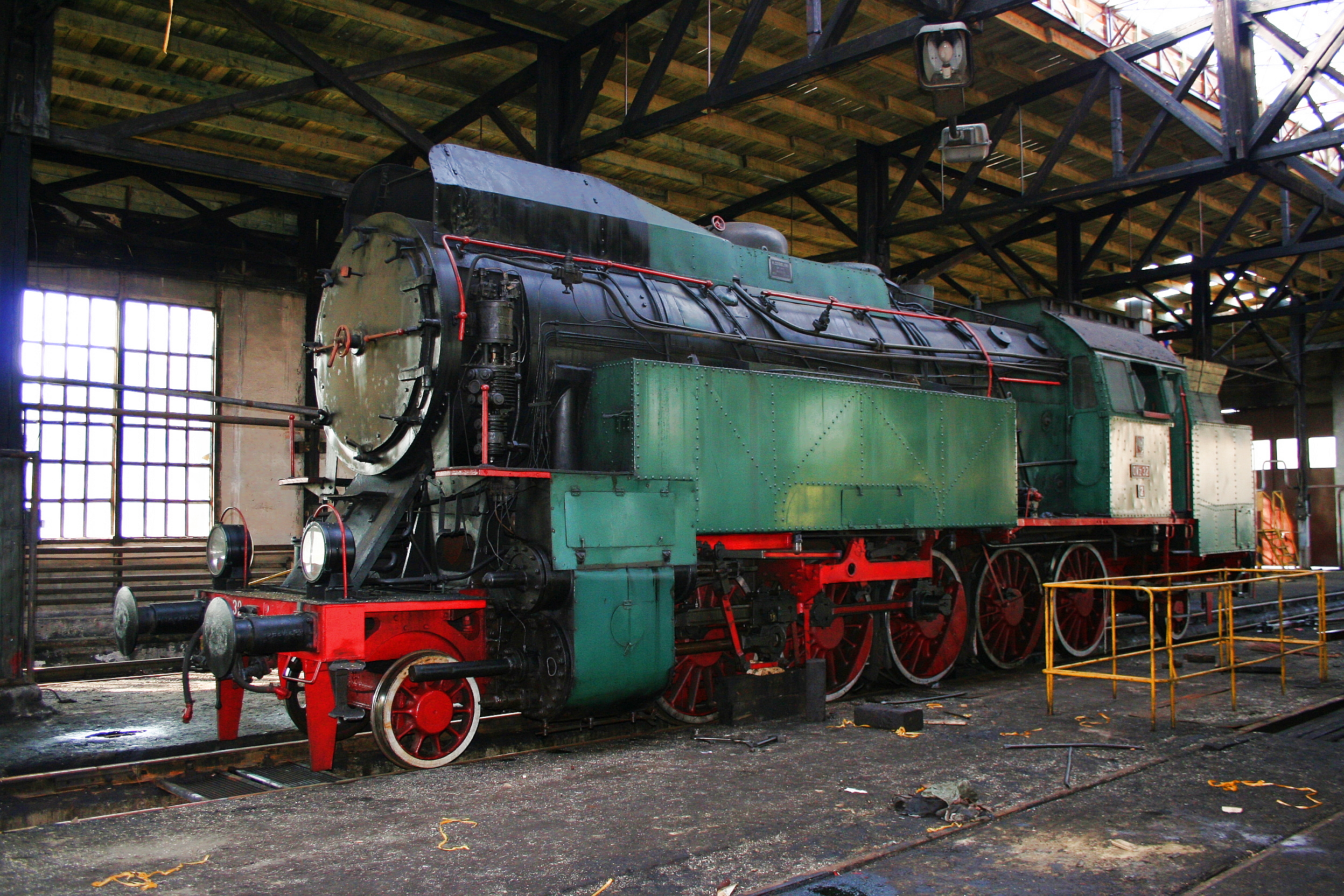 Dampflokomotive OKz 32-2 Chabowka 15.05.06